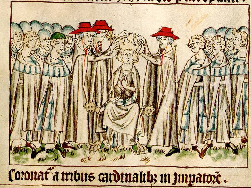 Korunovace Jindřicha VII. císařem v lateránské bazilice